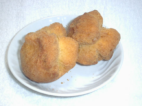 サーターアンダギー 沖縄県那覇市平和通りなみさと製 一個100円